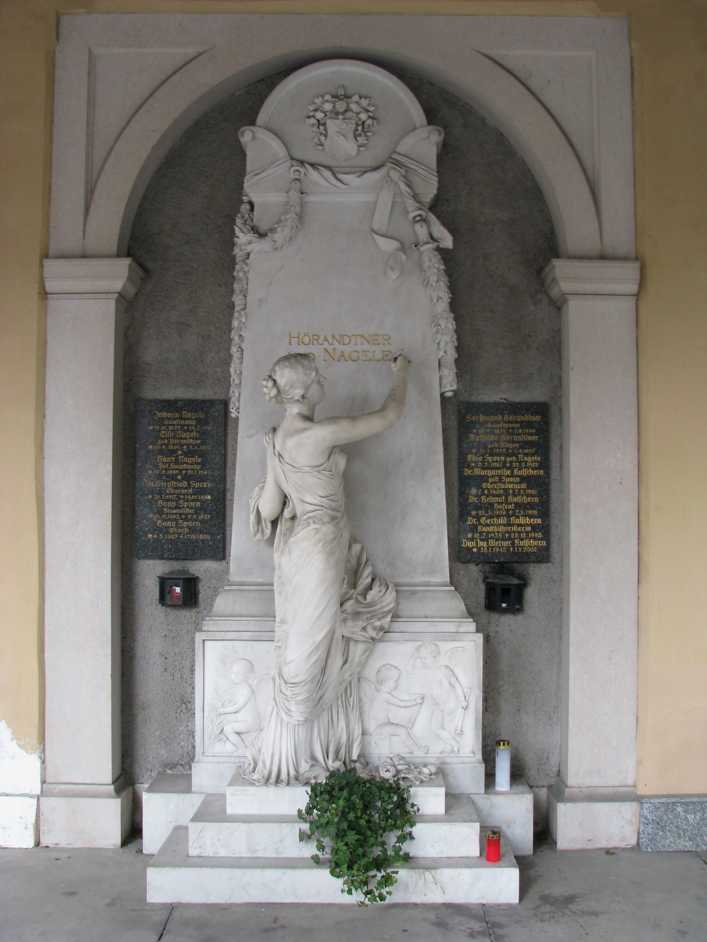 Westfriedhof Innsbruck, Grabmal Hörandtner und Nagele in den Nordarkaden des Südlichen Teils